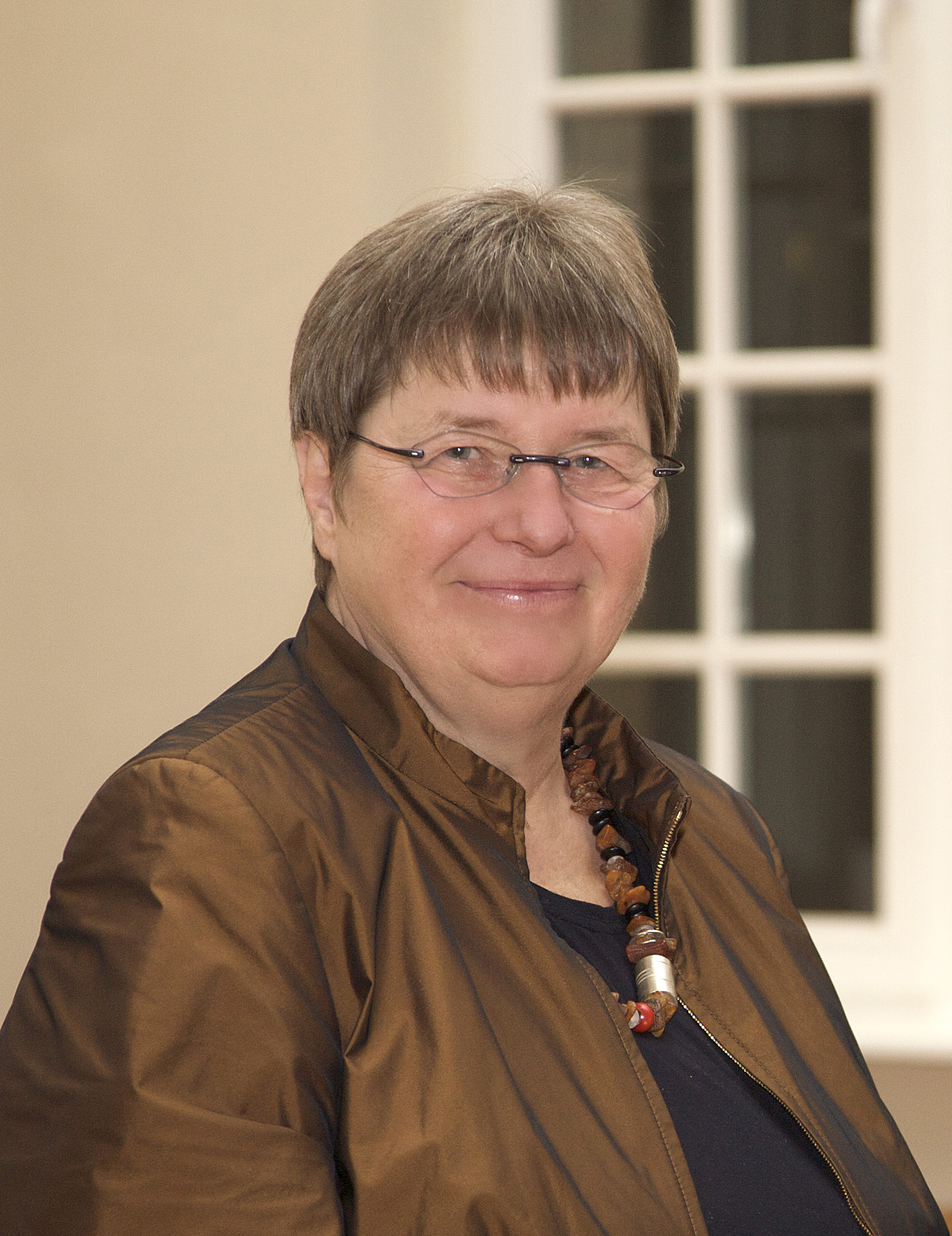 Porträt Sibylle Plogstedt